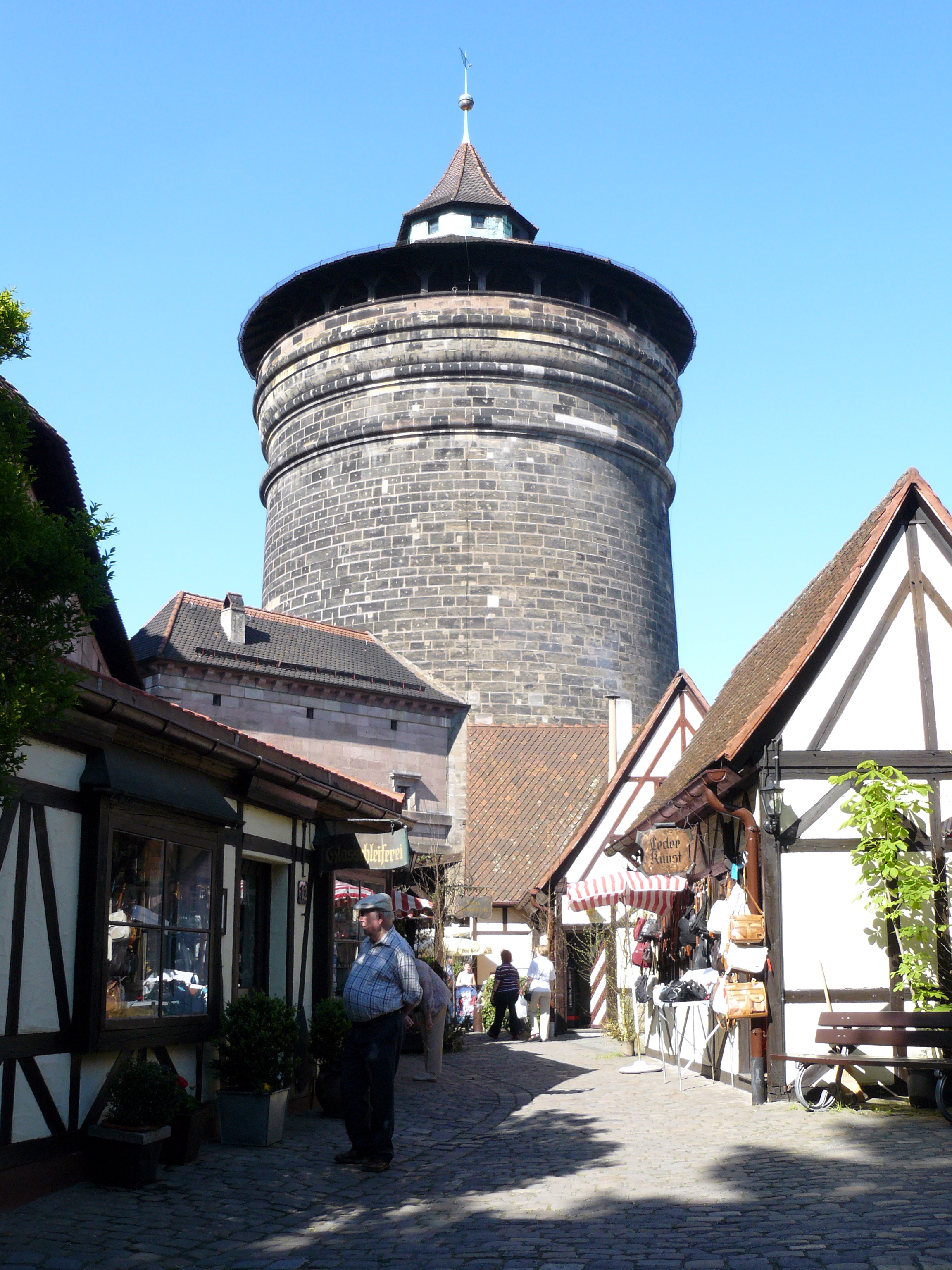 Handwerkerhof Nürnberg Innenansicht